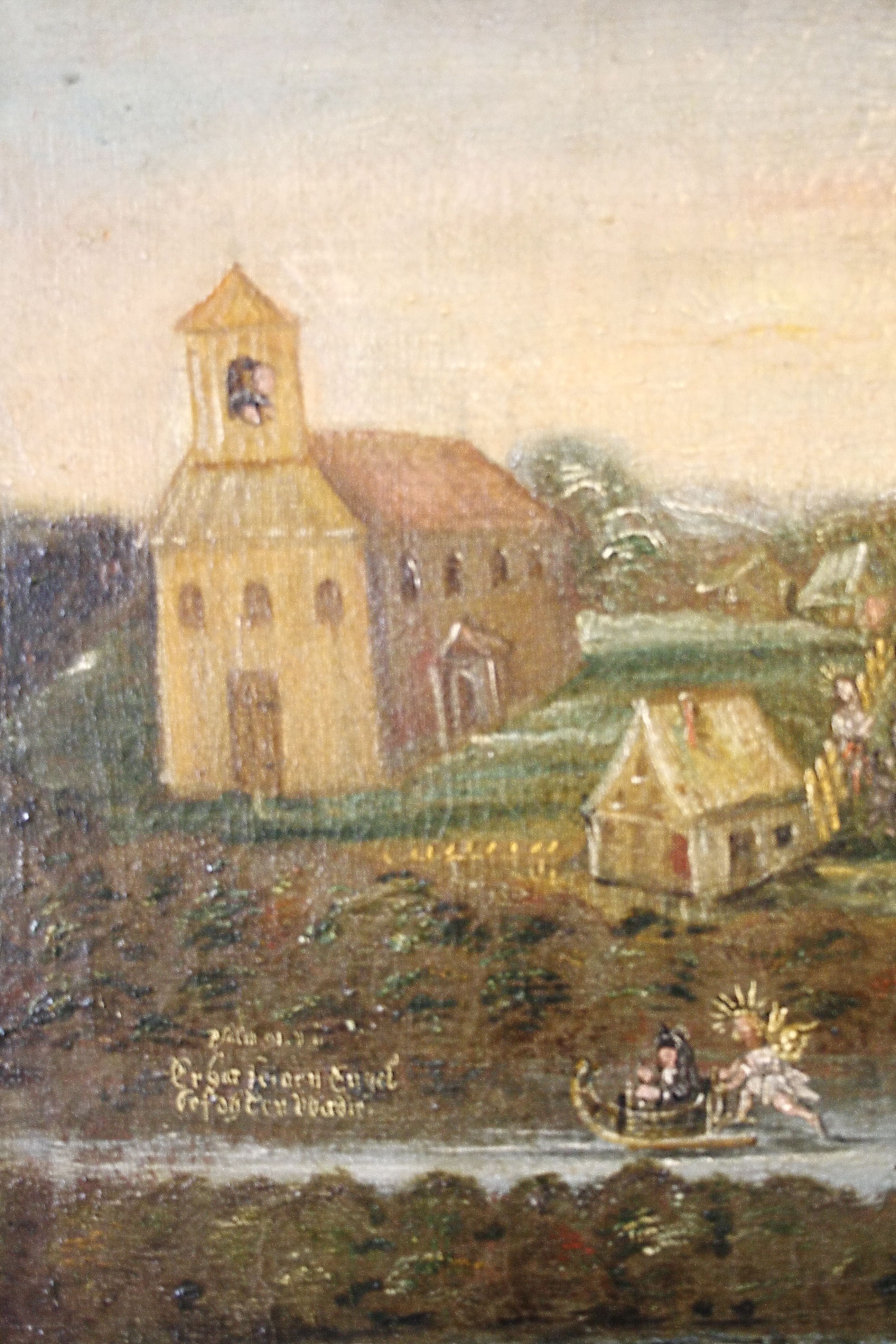 Auschnitt des Gemäldes mit der Wuthenower Kirche